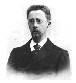 Victor Jernstedt (1854–1902), russischer Byzantinist